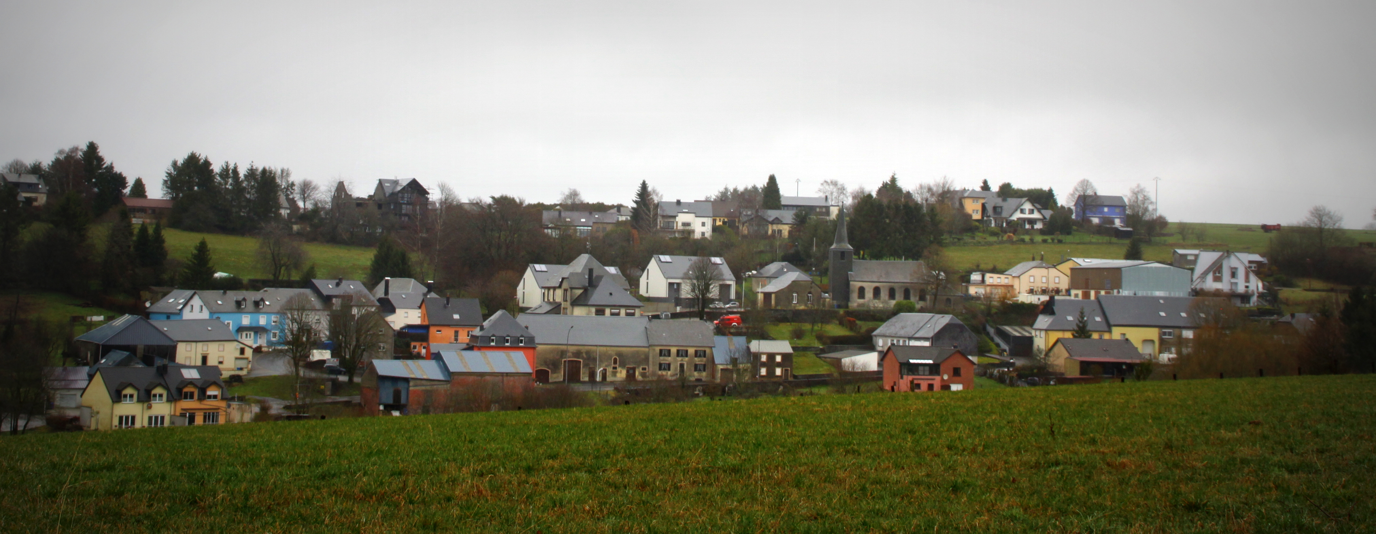 Wolwe vum Scheed aus gesinn